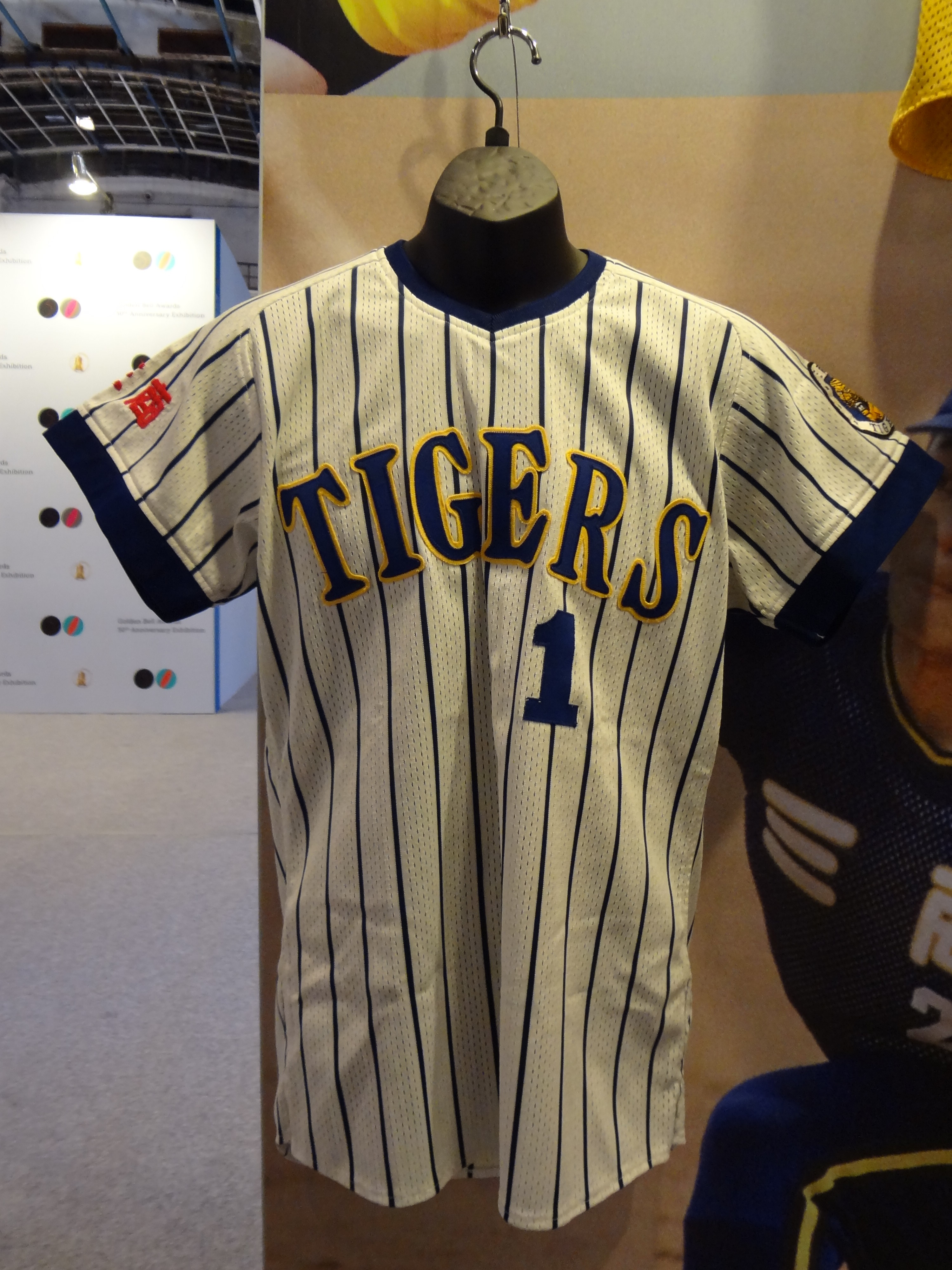 松山文化創意園區「金鐘五十．響」特別展展示品：中華職棒創始球隊三商虎球衣。